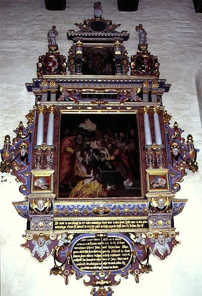 Oldenswort Kirke i Sydslesvig. Epitafium over Poppens